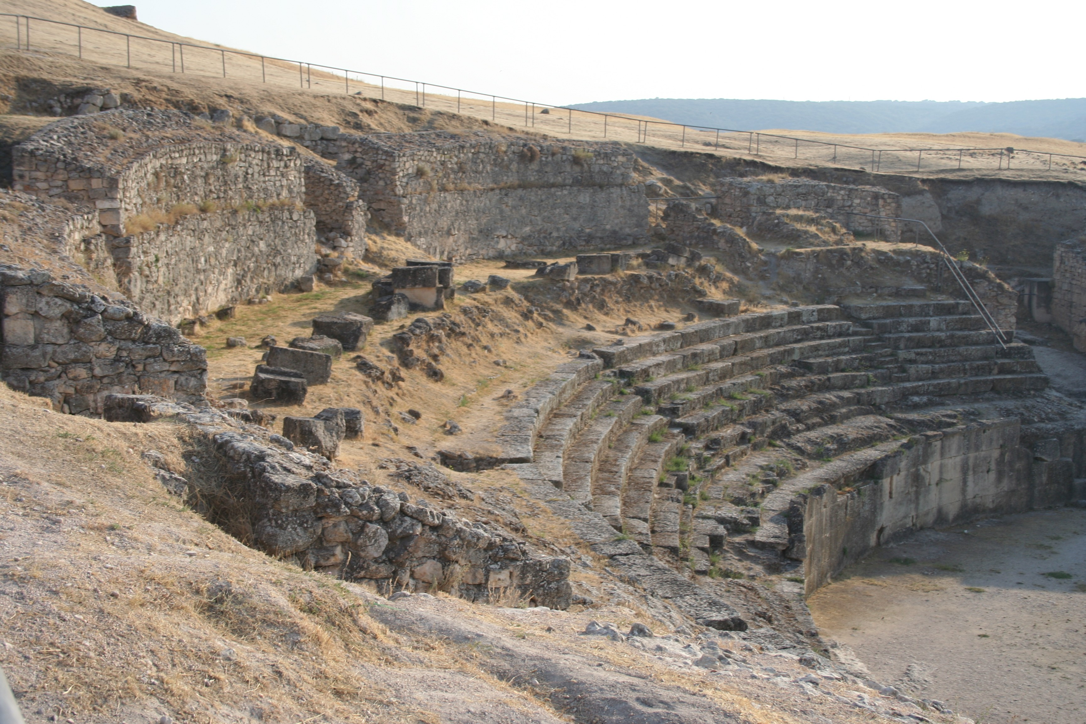 Circo Romano